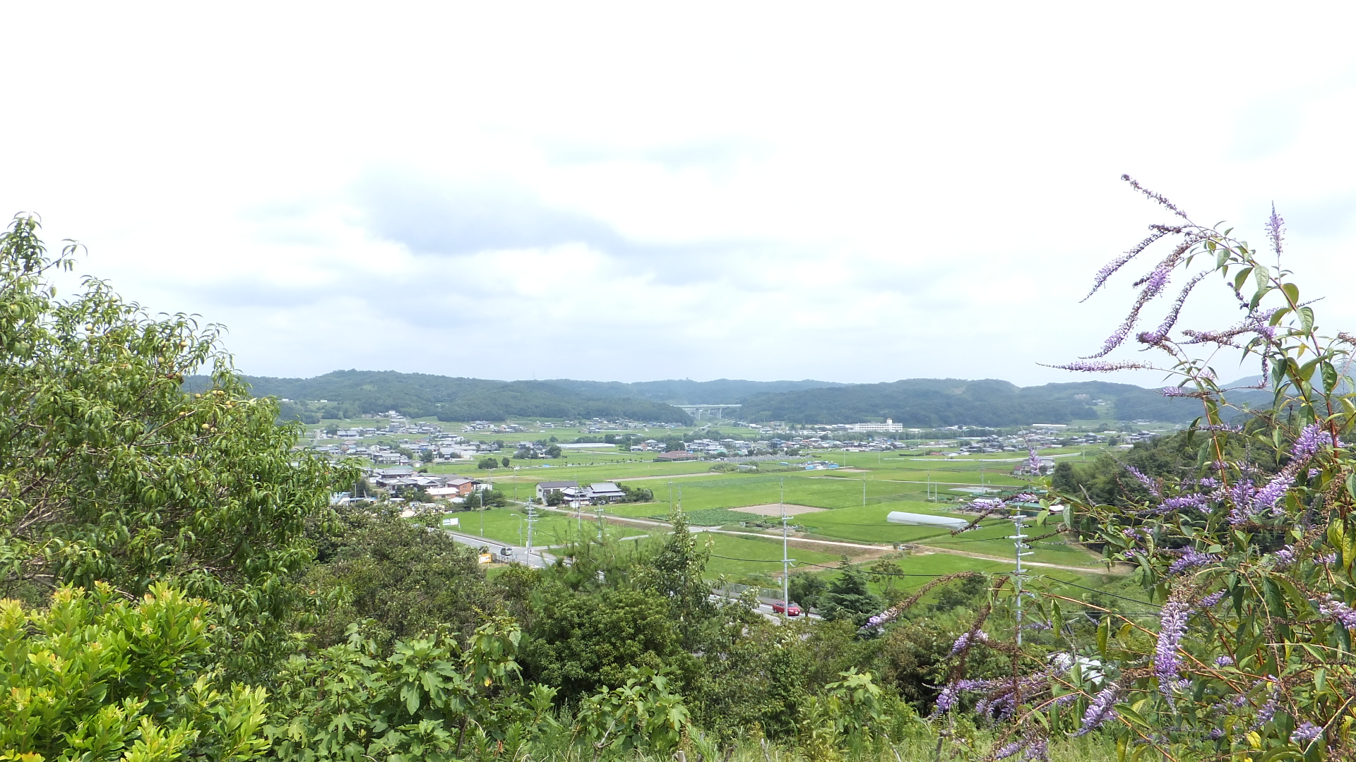 兵庫県三木市志染町高男寺